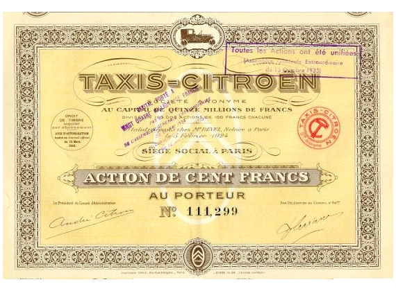 ACTION TAXIS CITROEN (1924)